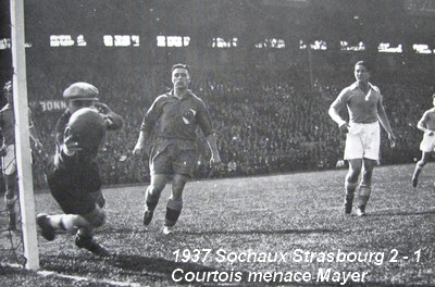 Coupe de France de football 1936-1937 : finale entre FC Sochaux et RC Strasbourg